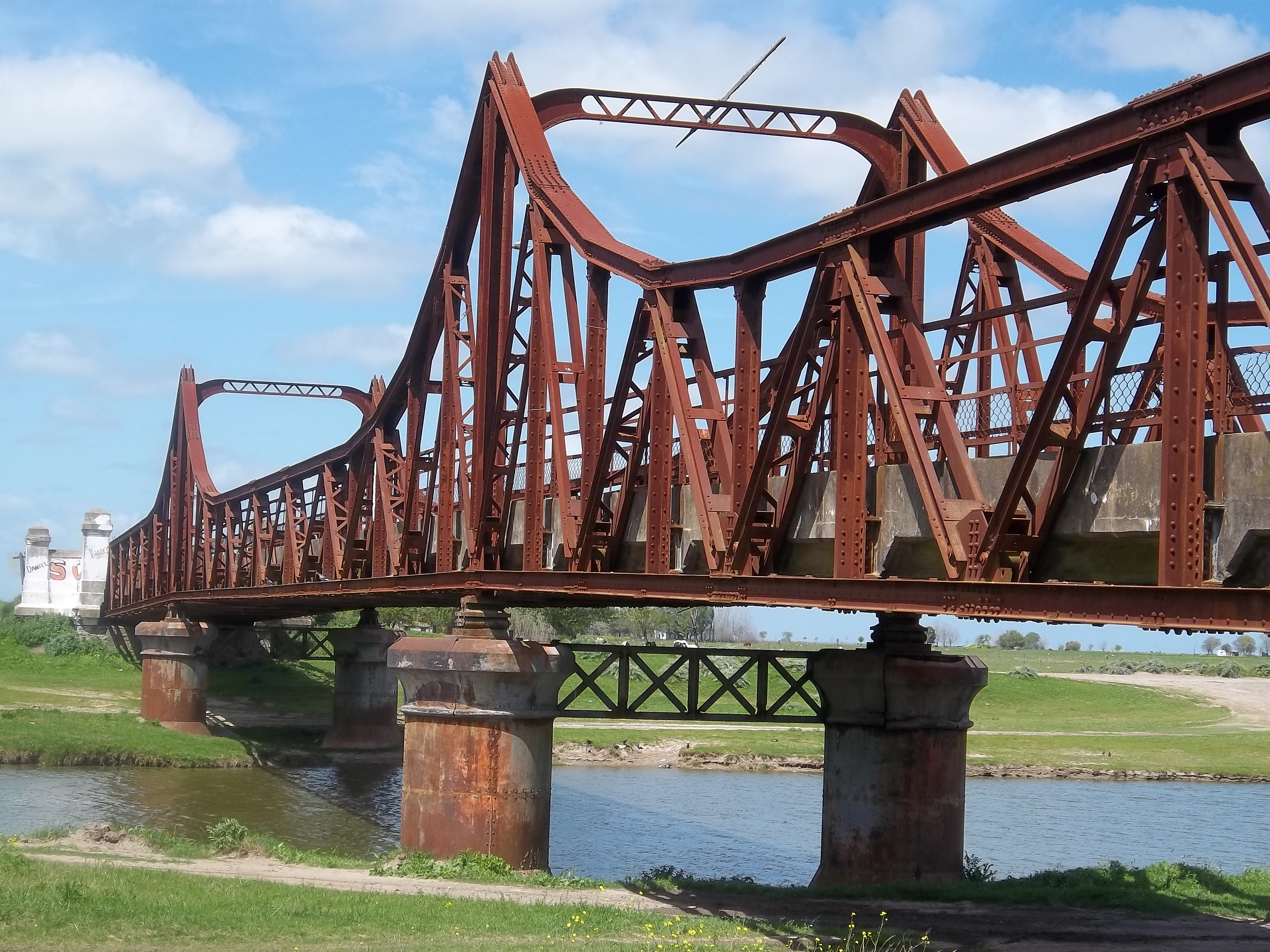 Viejo puente de la Ruta Provincial 11 sobre el Canal 1 en Villa Roch, partido de Tordillo, provincia de Buenos Aires, Argentina.